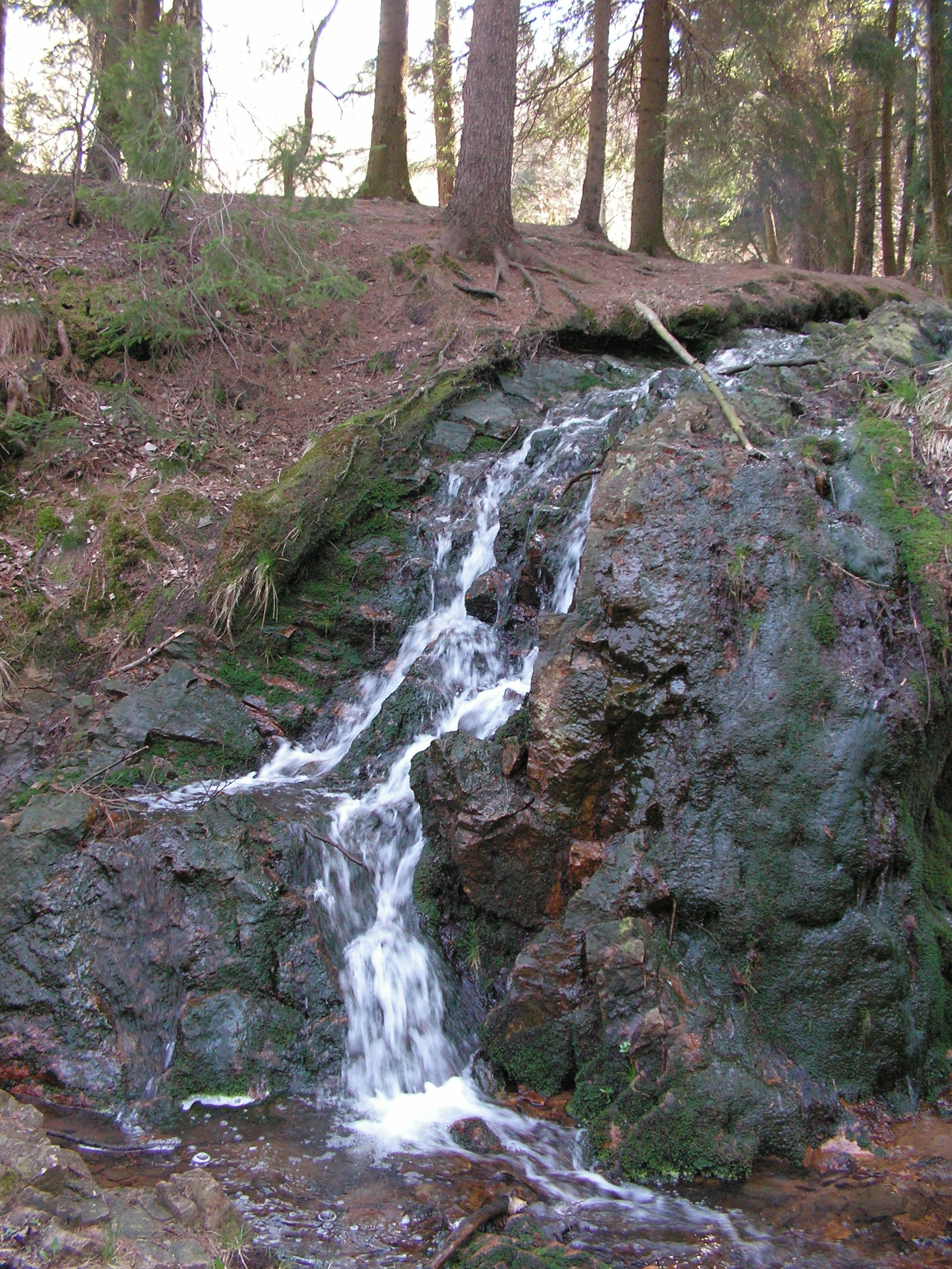 Vojnoměstecký vodopád se nachází východně od Vojnova Městce na pravostraném přítoku Městeckého potoka